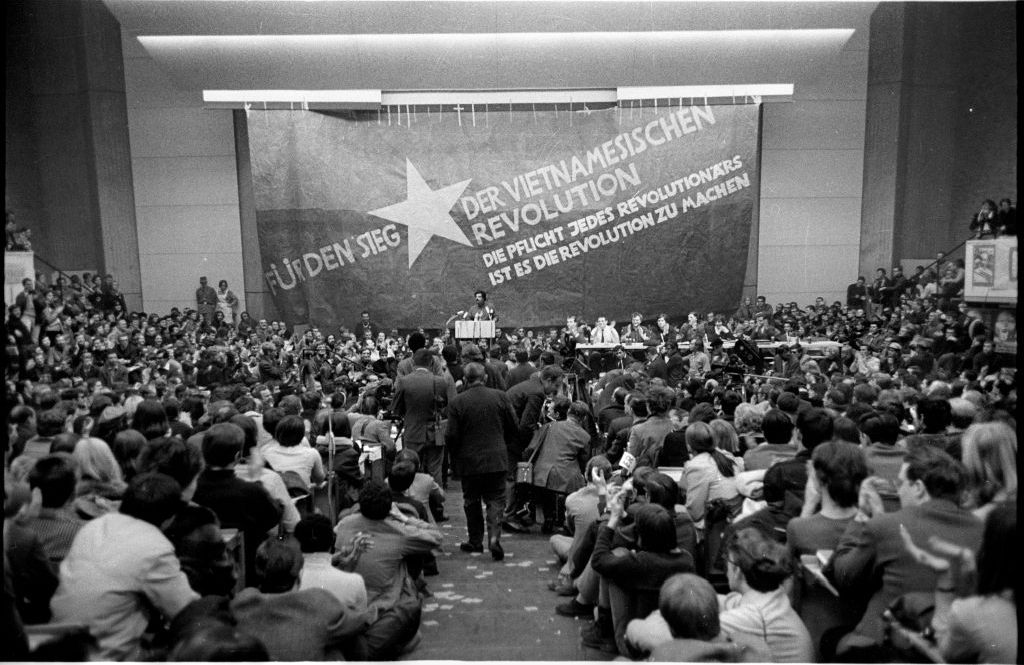 2001_03_0275.0001 Ludwig Binder: Studentenrevolte 1967/68, West-Berlin; veröffentlicht vom Haus der Geschichte